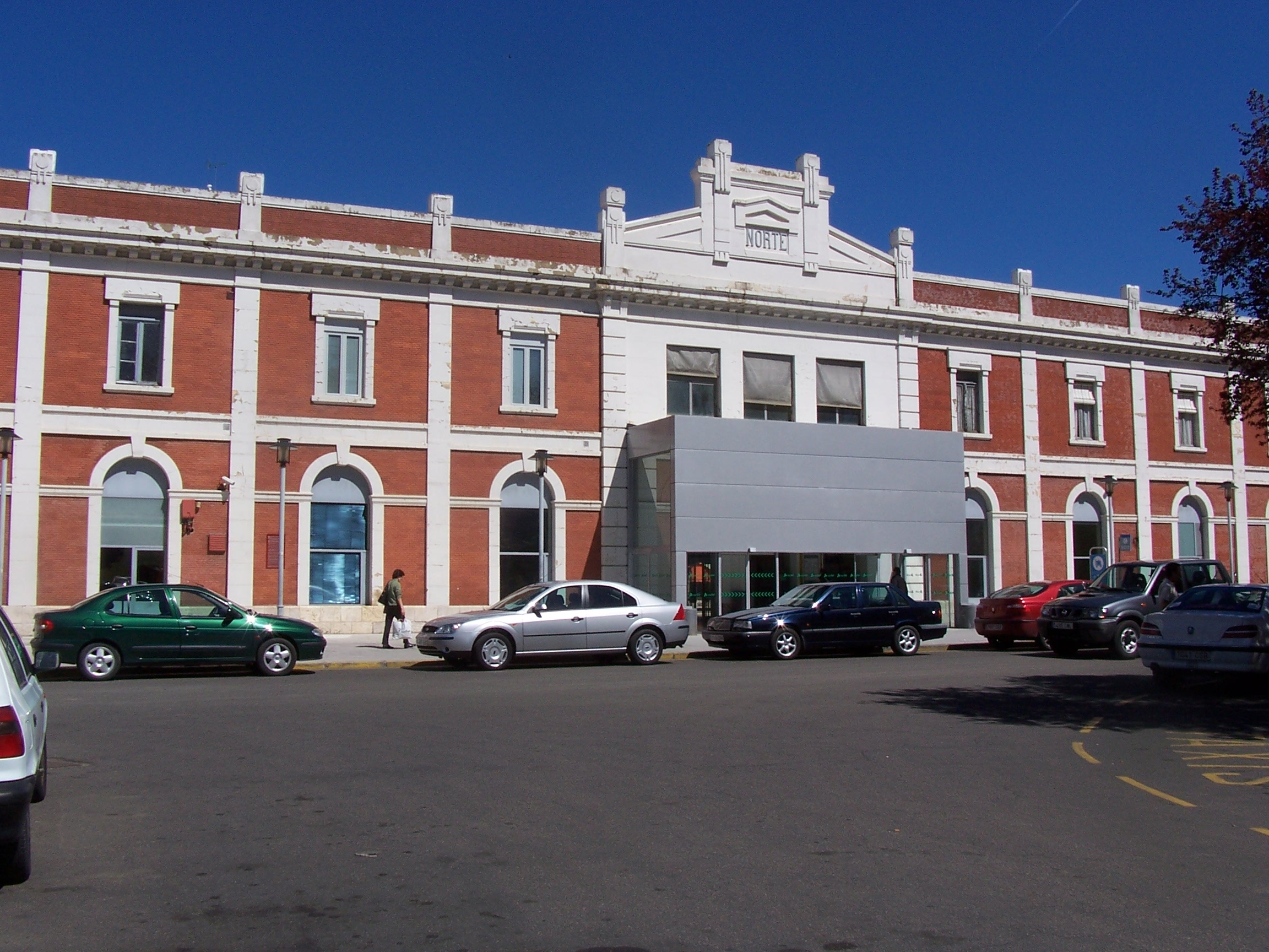 Fachada de la estacion de trenes en Palencia